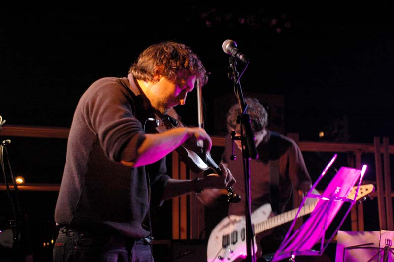 Yann Tiersen amb Christophe Miossec a Vauban, Brest